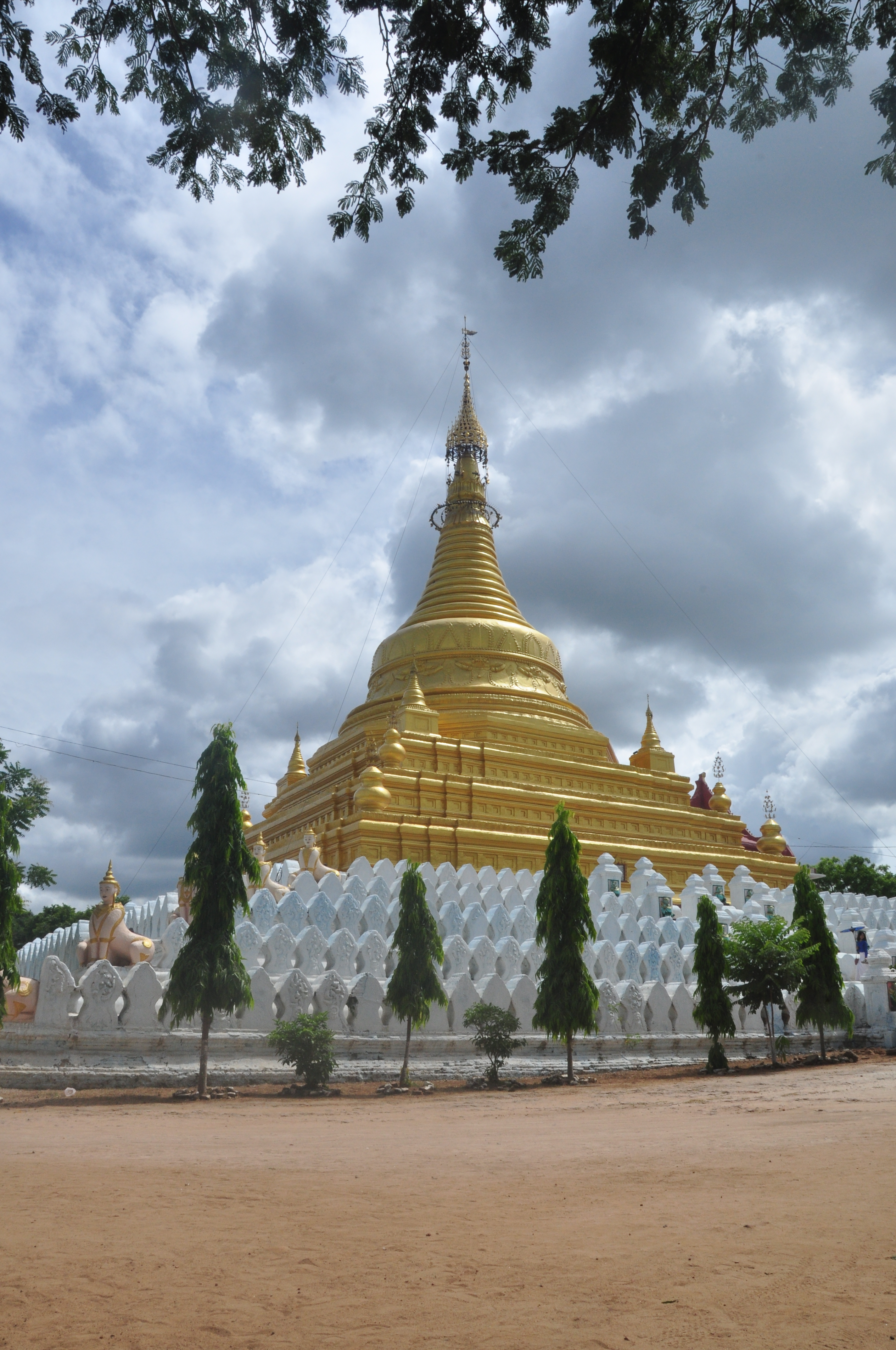 မြန်မာဘာသာ: စန္ဒမုနိဘုရား